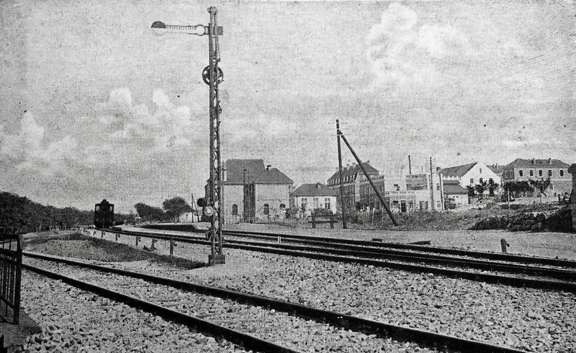 青岛大港站周边